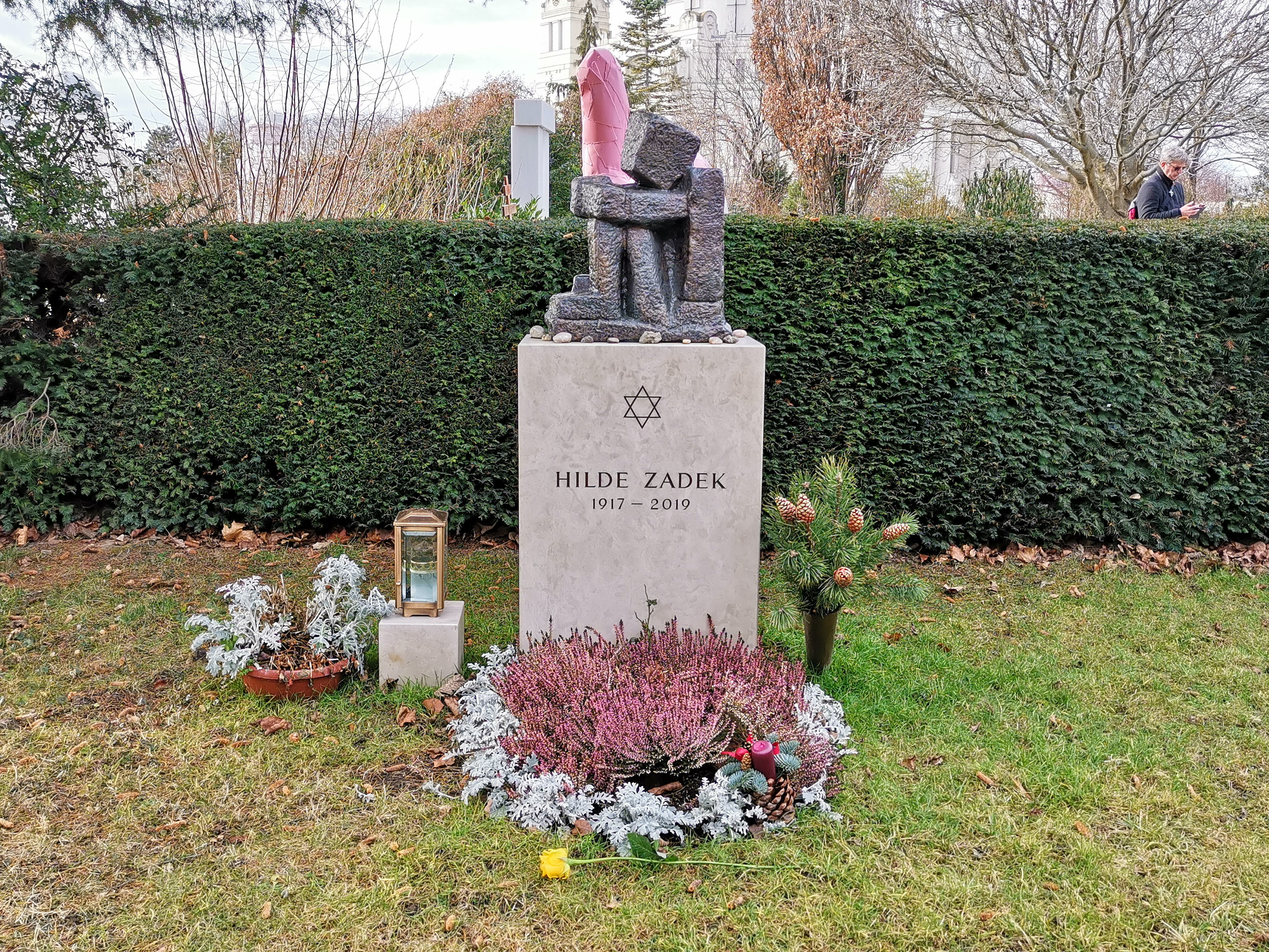 Grab von Hilde Zadek auf dem Wiener Zentralfriedhof